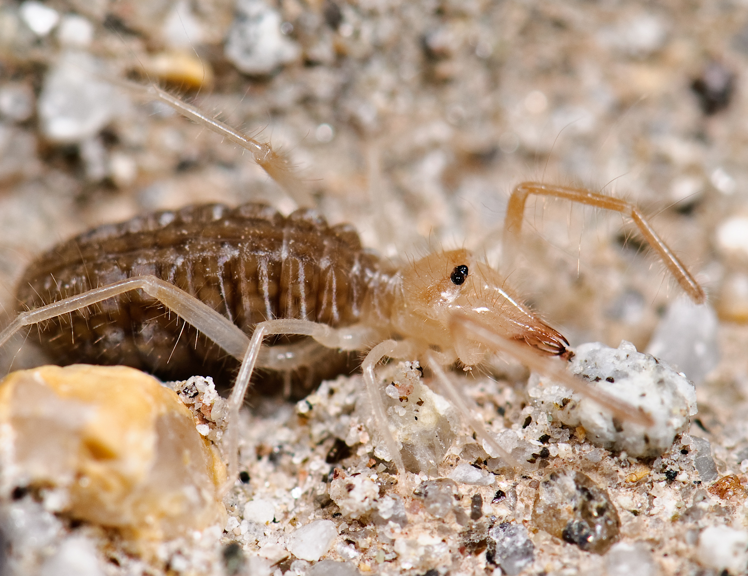 Arachnida, Solifugae, immature